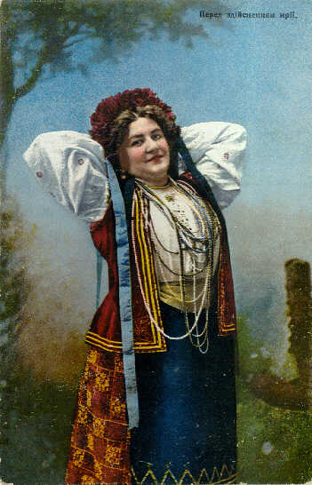 Перед осуществлением мечты/ Актриса Заньковецкая, год выпуска 1905